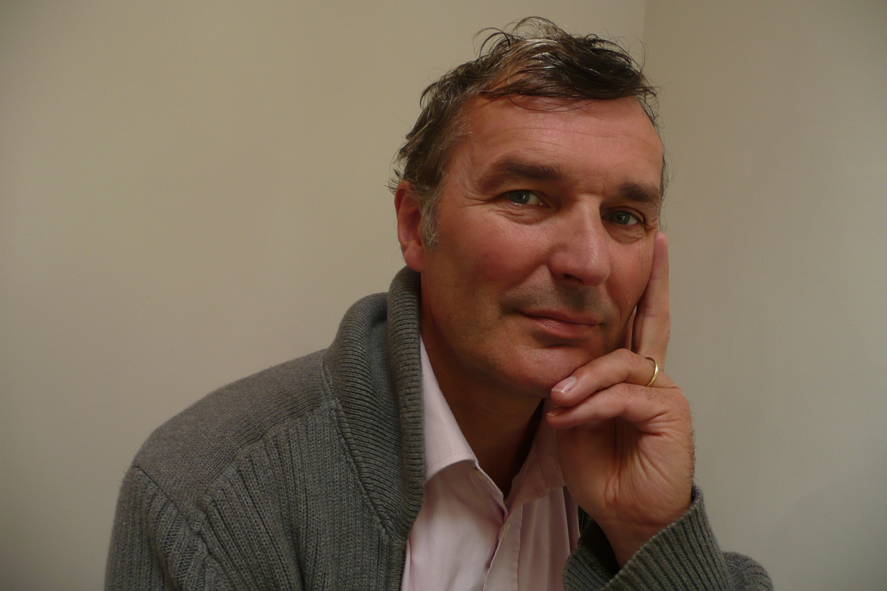 Ruud-Jan Kokke